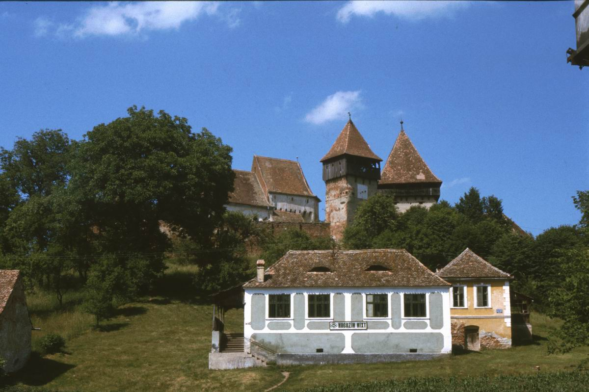 Kirchenburg Almen (Alma-Vii, Sibiu) Südansicht